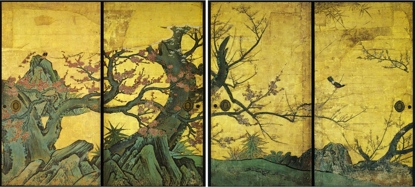 Prune sur paravent du peintre Kanō Sanraku (17e siècle). Couleur or sur papier 184x99.